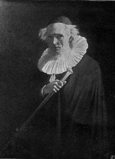 Finnish actor Oskari Vilho (1840-1883)